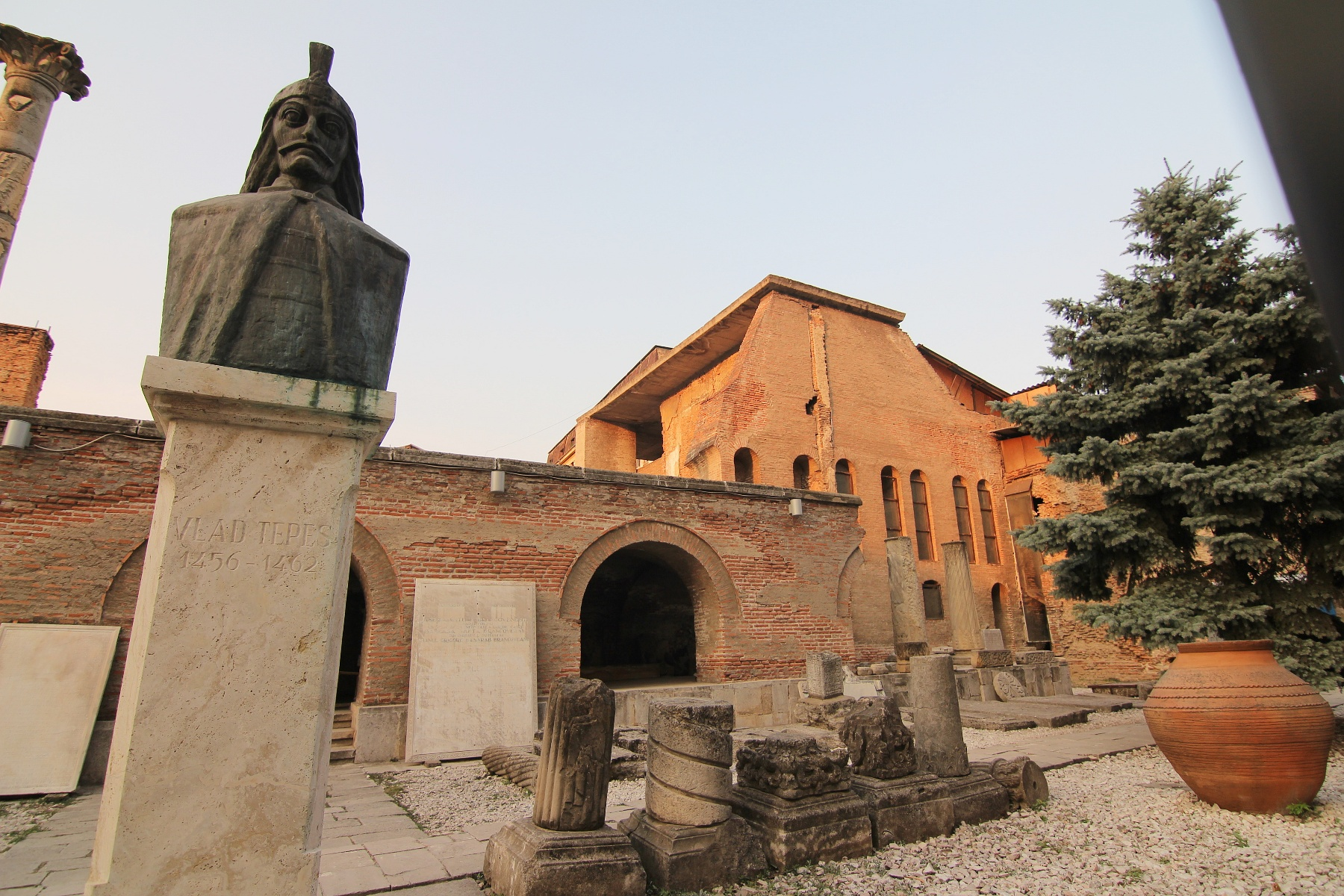 Ansamblul medieval "Curtea Veche"